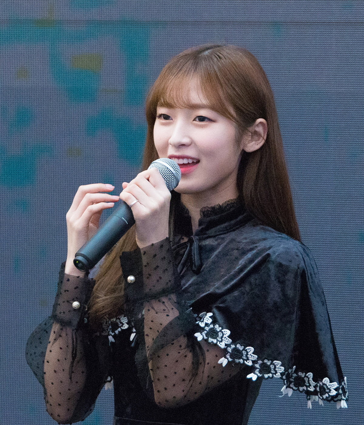 20180121 오마이걸 고양 스타필드 팬싸인회